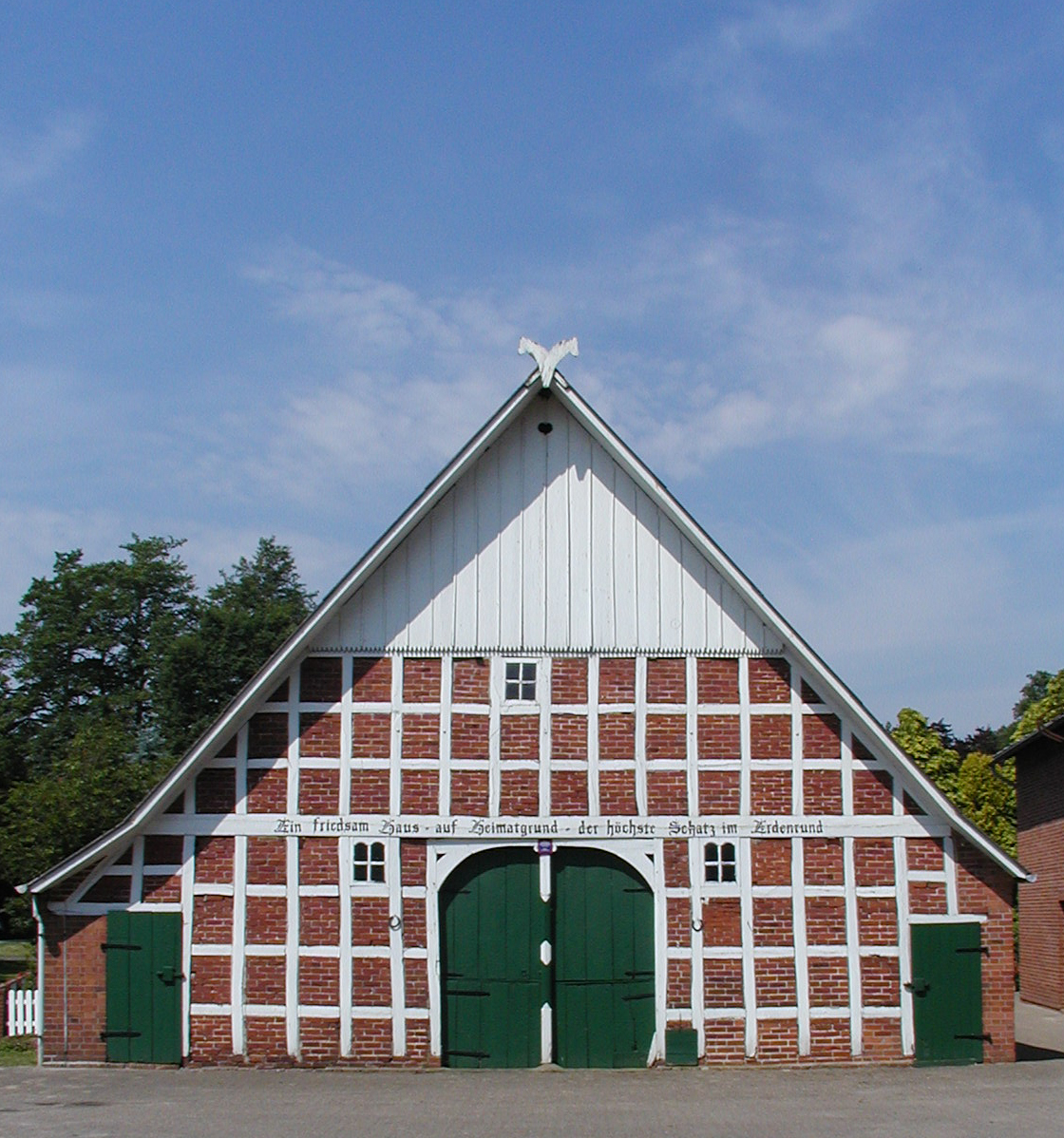 Ein Bauerhaus, Mittelstenahe